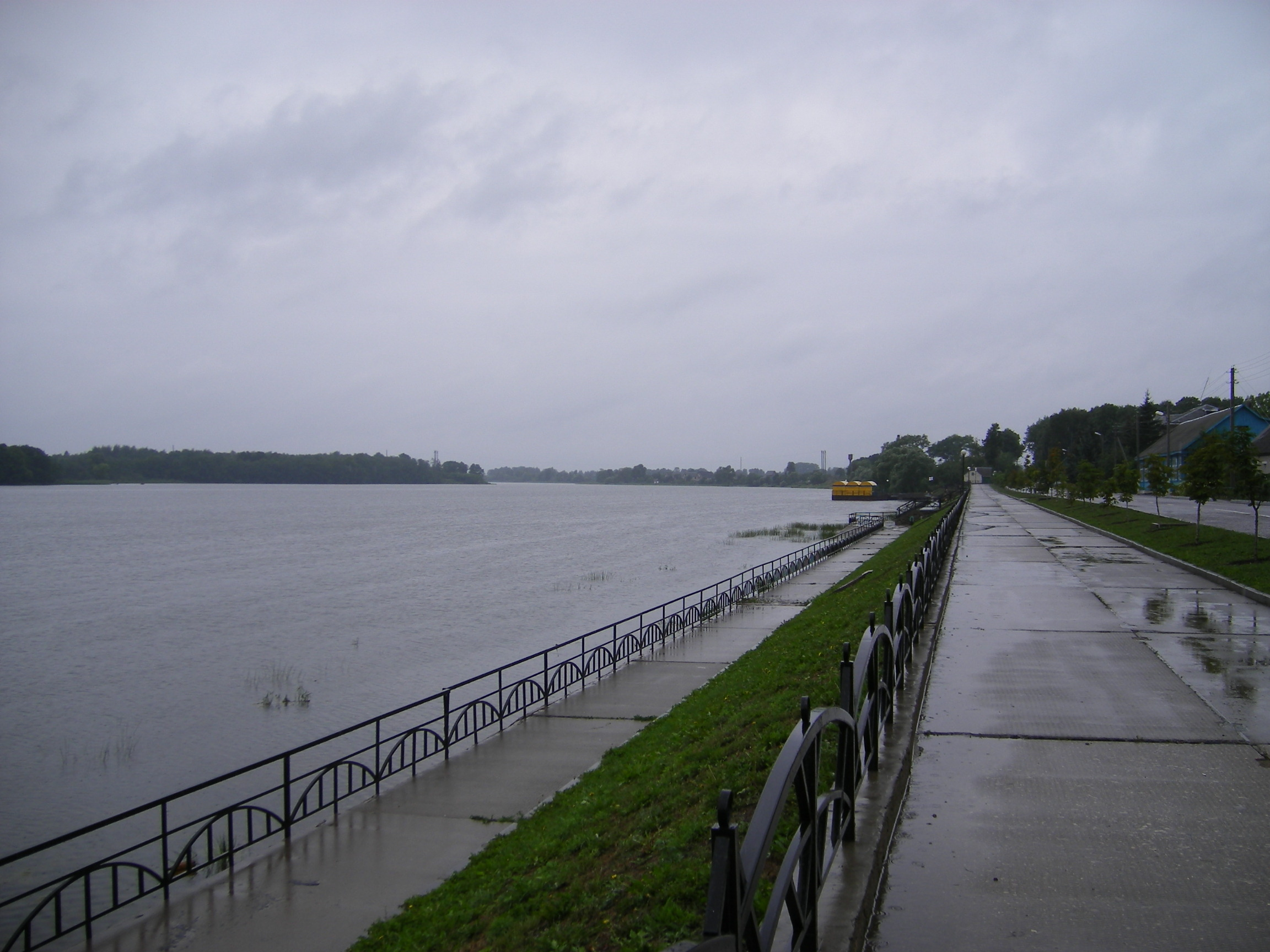 Miorskoye Lake in Miory, Belarus